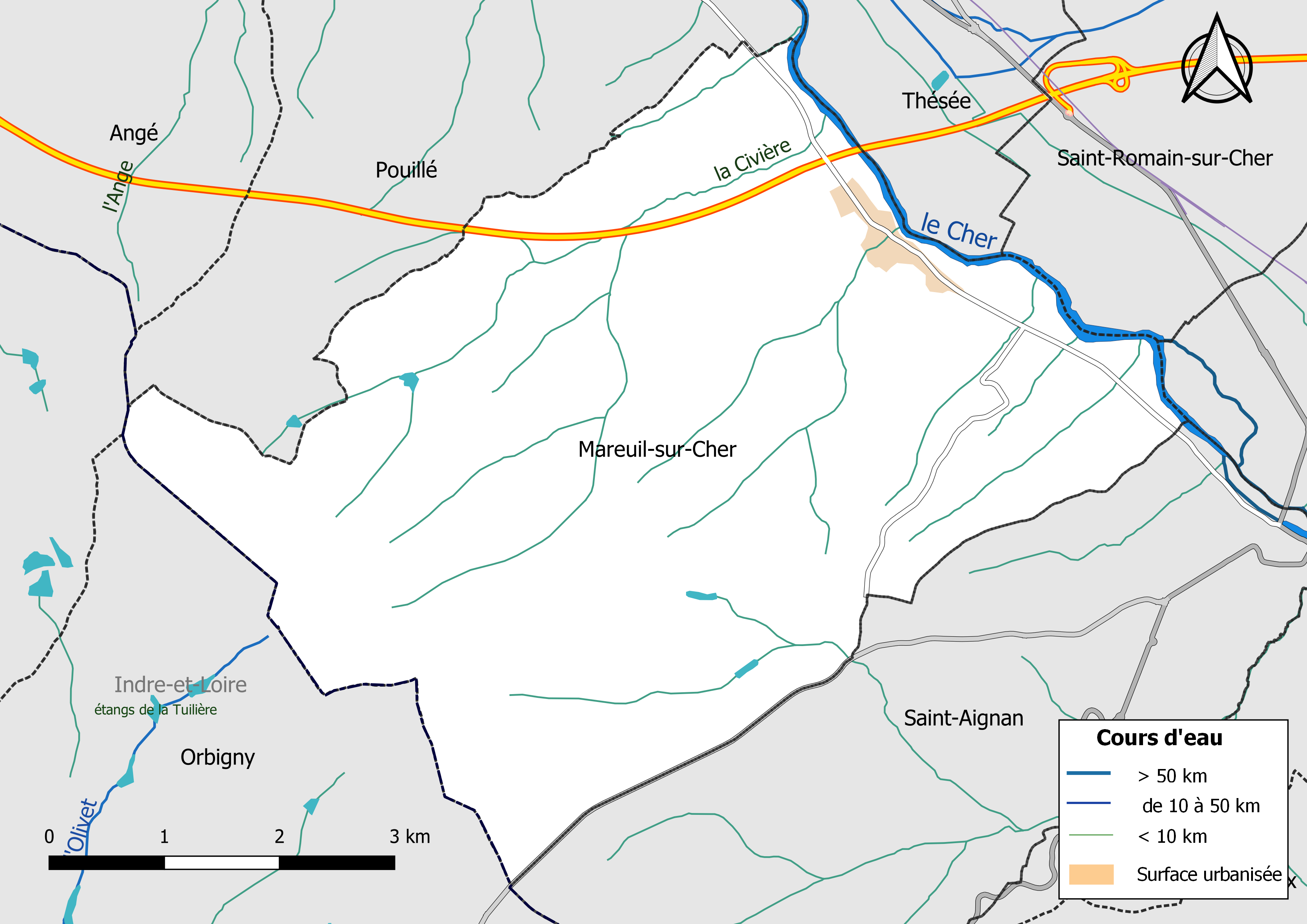 Carte du réseau hydrographique de la commune de Mareuil-sur-Cher (Loir-et-Cher, France).